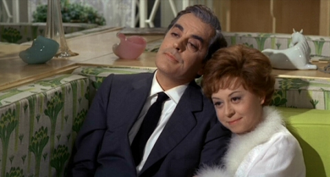 Képkocka a „Júlia és a szellemek” című filmből